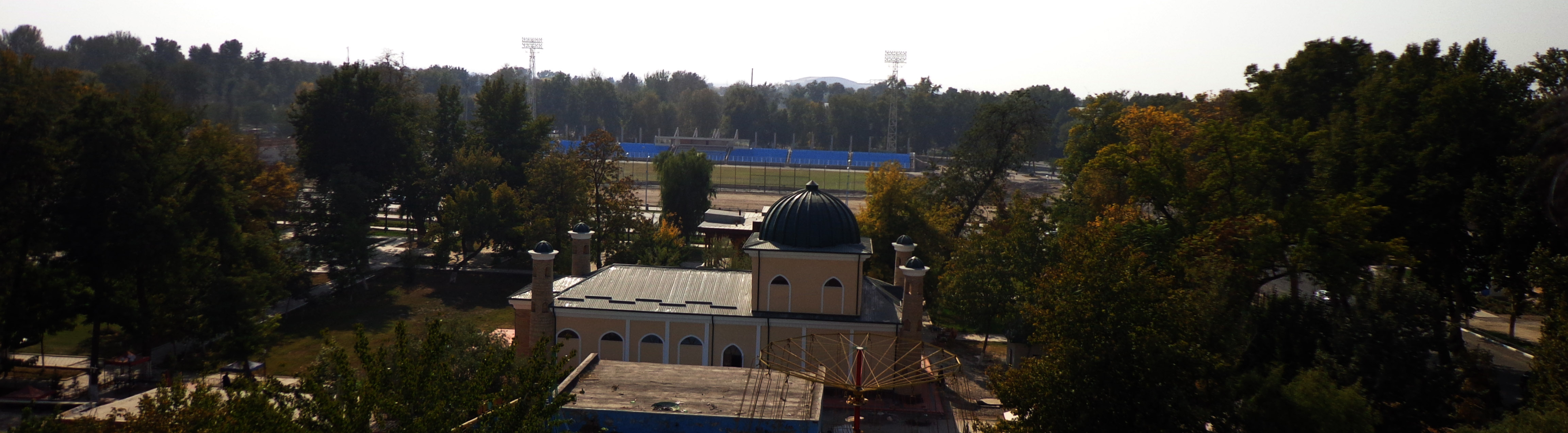 Фергана вид ниже птичьего полета